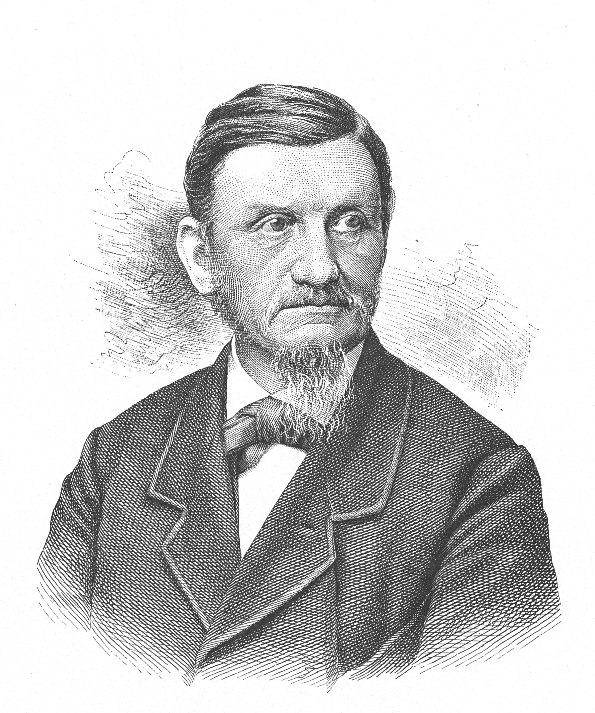 Strichklischee von Costantino Bernasconi (extrahiert)